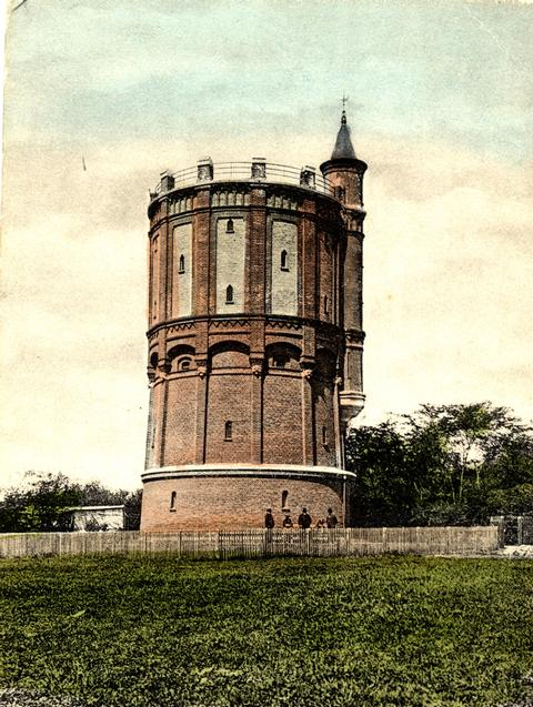 Vandtårnet på H.A. Clausens Vej, former water tower in Gentofte, est. 1899, demolished 1957